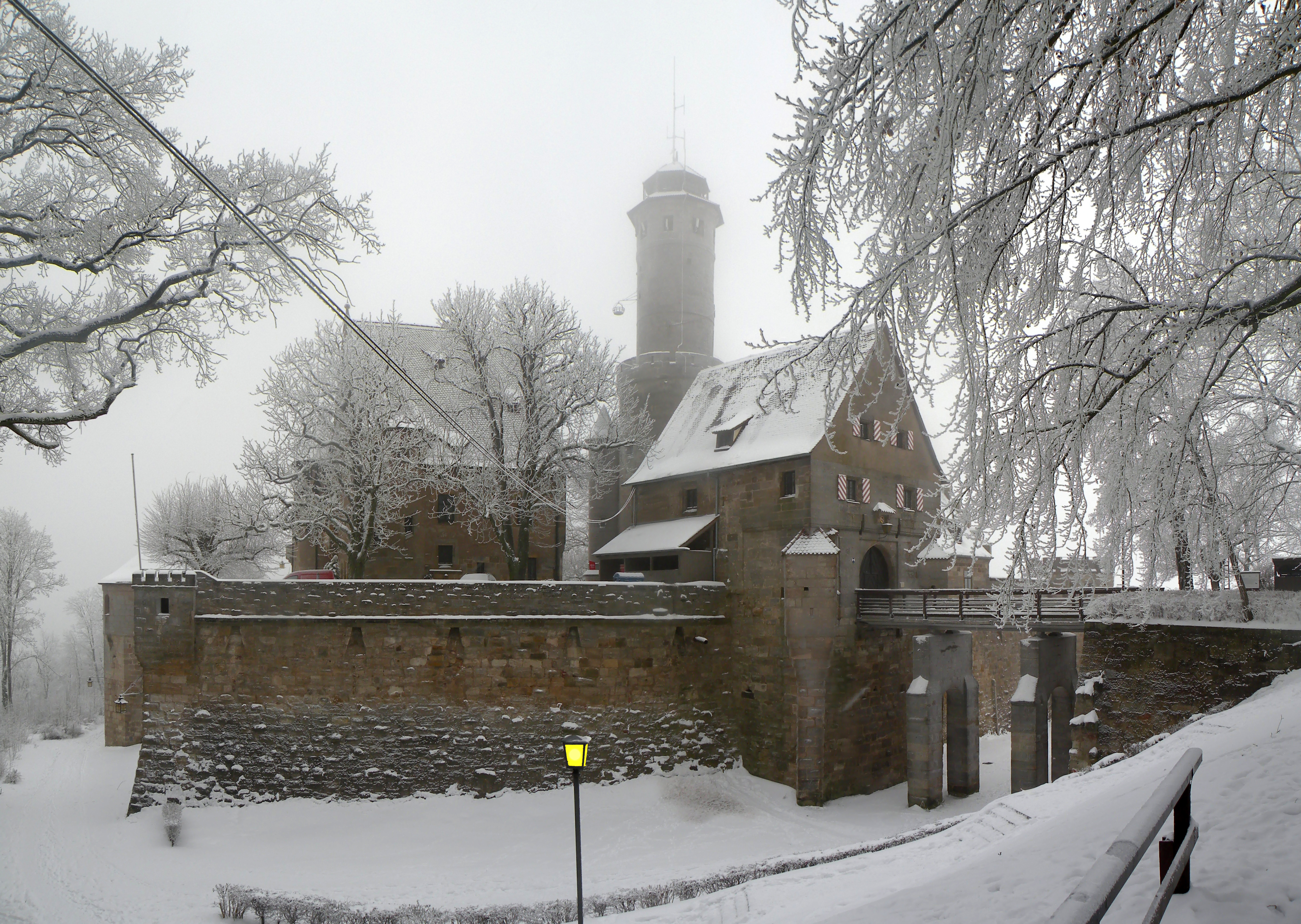 Altenburg in Bamberg.Panorama.